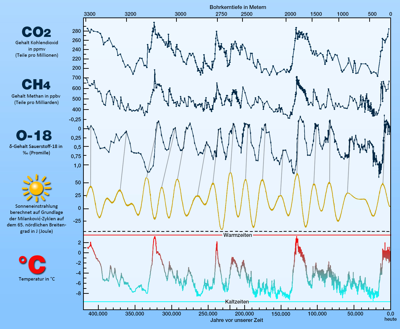 Darstellung der Korrelation von Milankovic und Erdtemperatur. Die Erdtemperatur wurde ermittelt aus dem Methan-, Kohlendioxyd- und O-18-Gehalt von Eisbohrkernen.